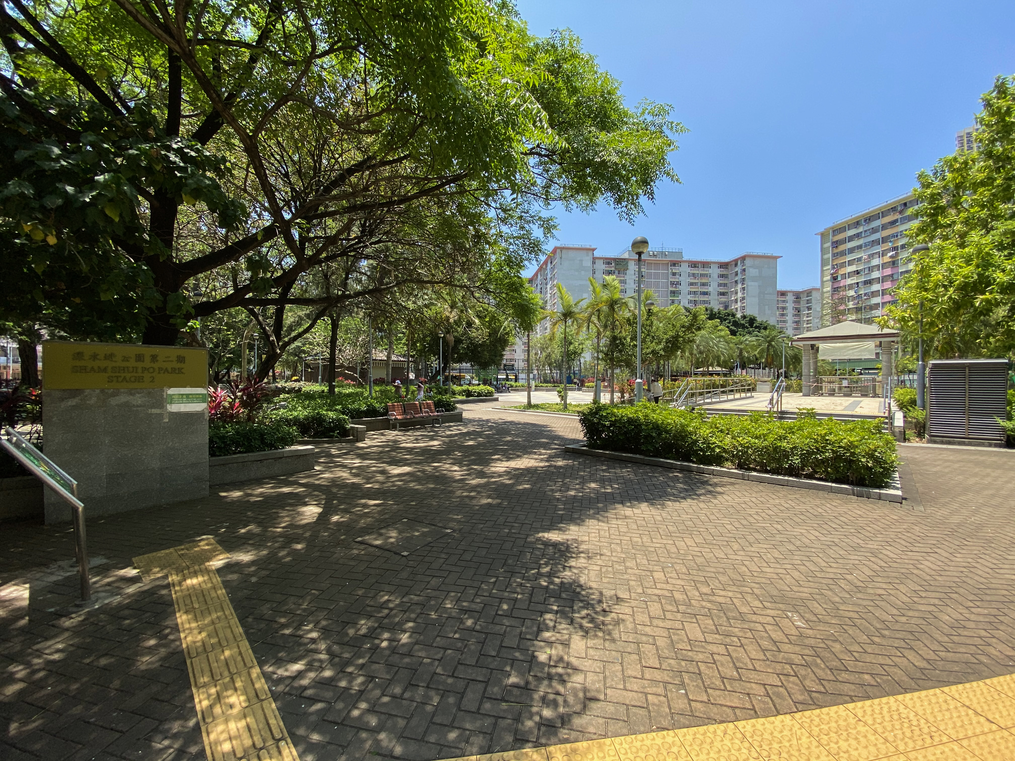 Sham Shui Po Park Phase 2